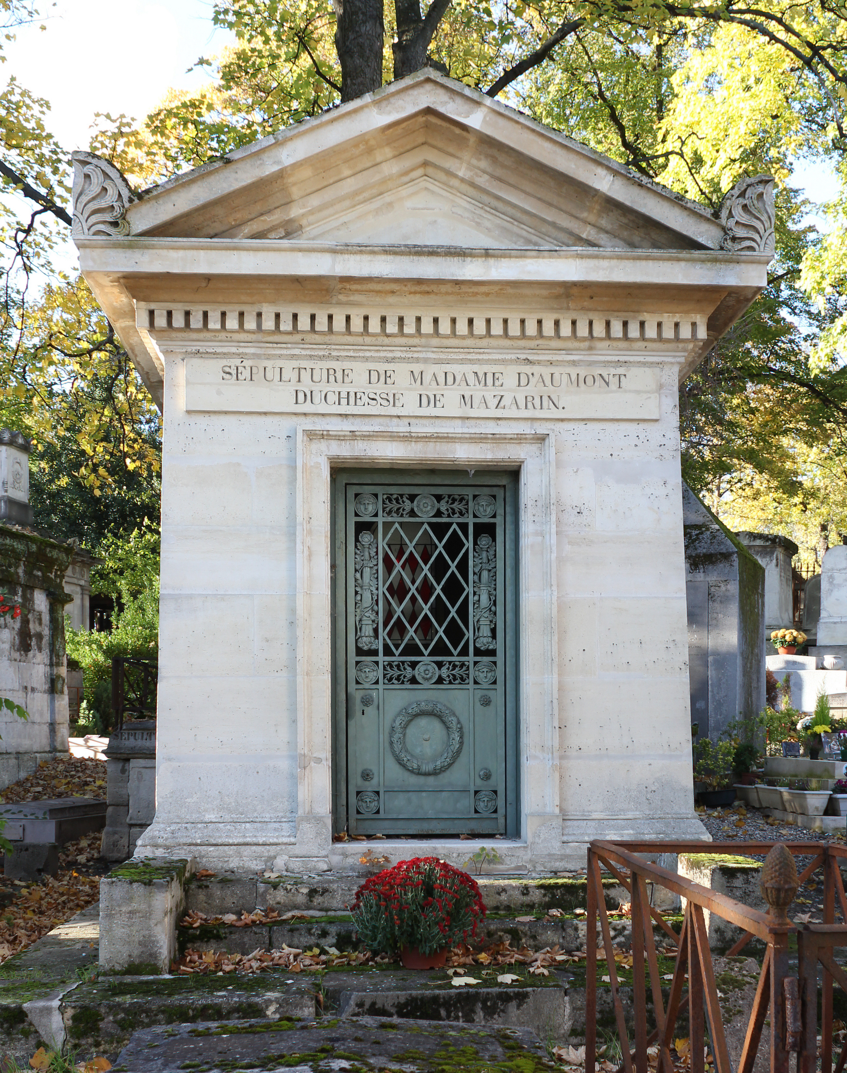 Cénotaphe de Louise Félicité Victoire d'Aumont duchesse de Mazarin (1759-1825).